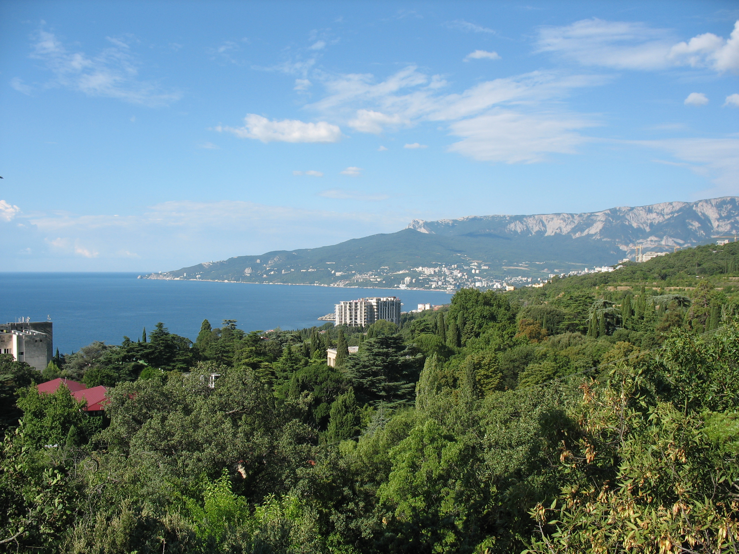 Ялтинский залив.JPG